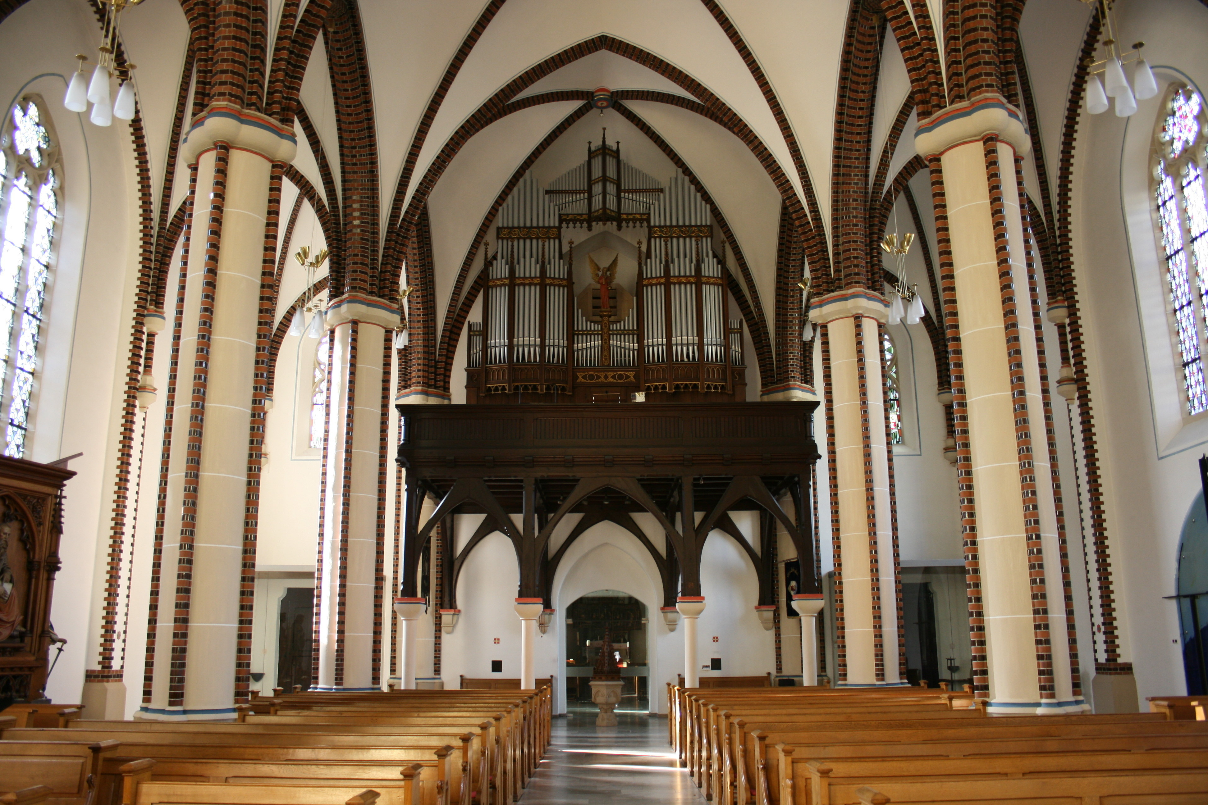 Sankt Matthäus in Altena